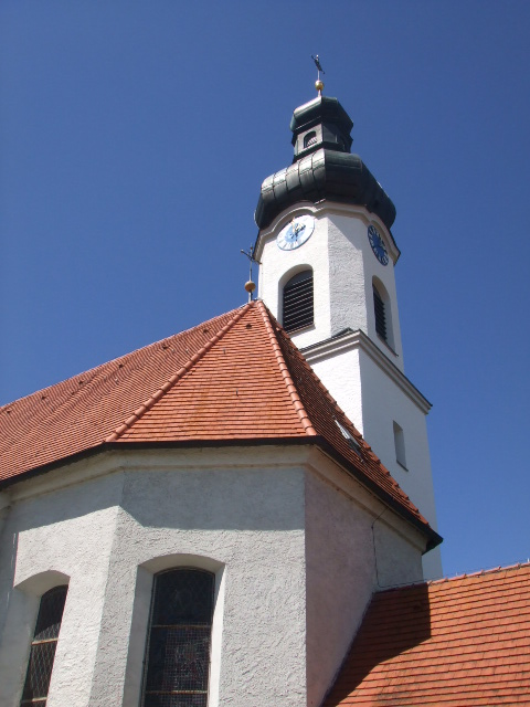 Pfarrkirche Maria Immaculata, Schwarzenberg, Gemeinde Oy-Mittelberg, Landkreis Oberallgäu